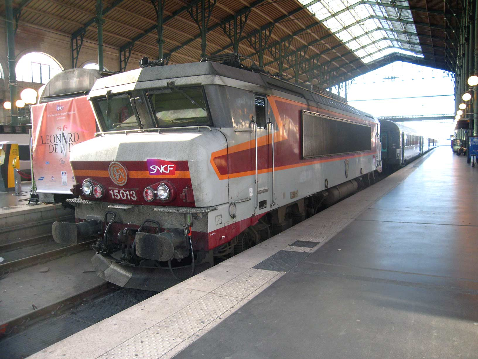 Locomotive electrique de la serie 15000 a la gare du Nord Lieu : Paris, France Date : Juin 2006 Auteur : photo personnelle